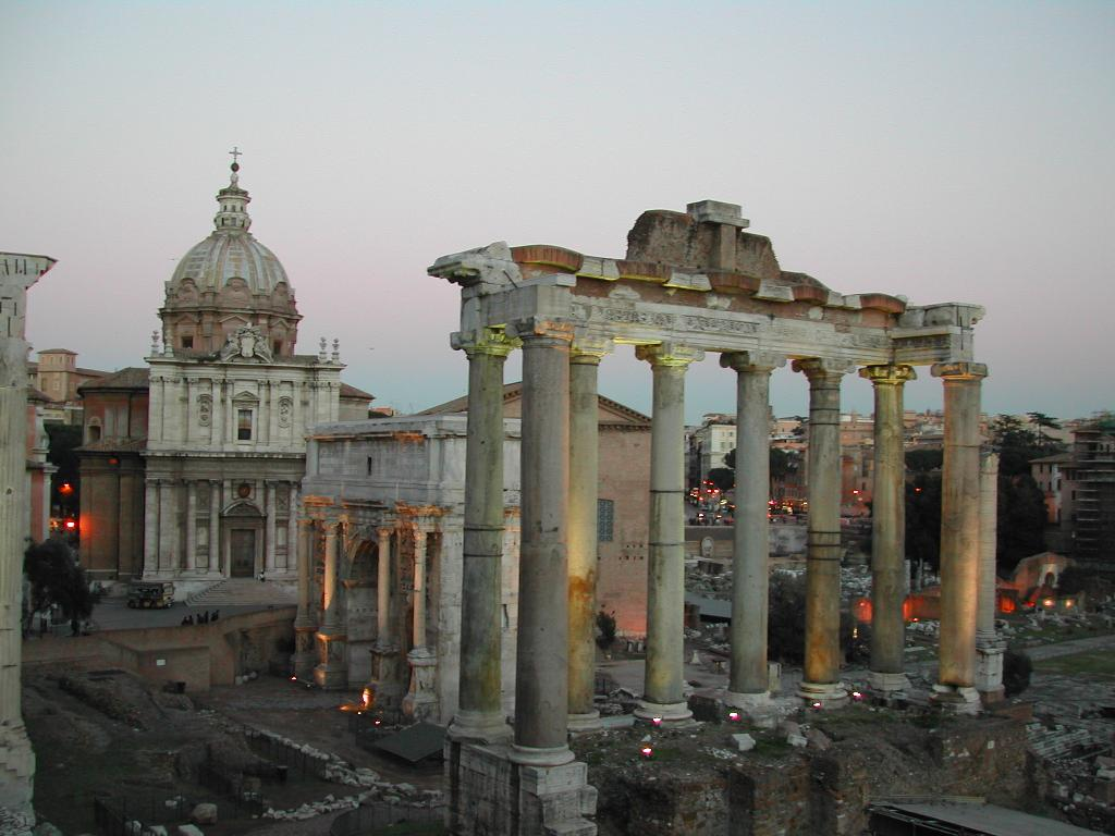 Roma, Foro romano: tempio di Saturno.